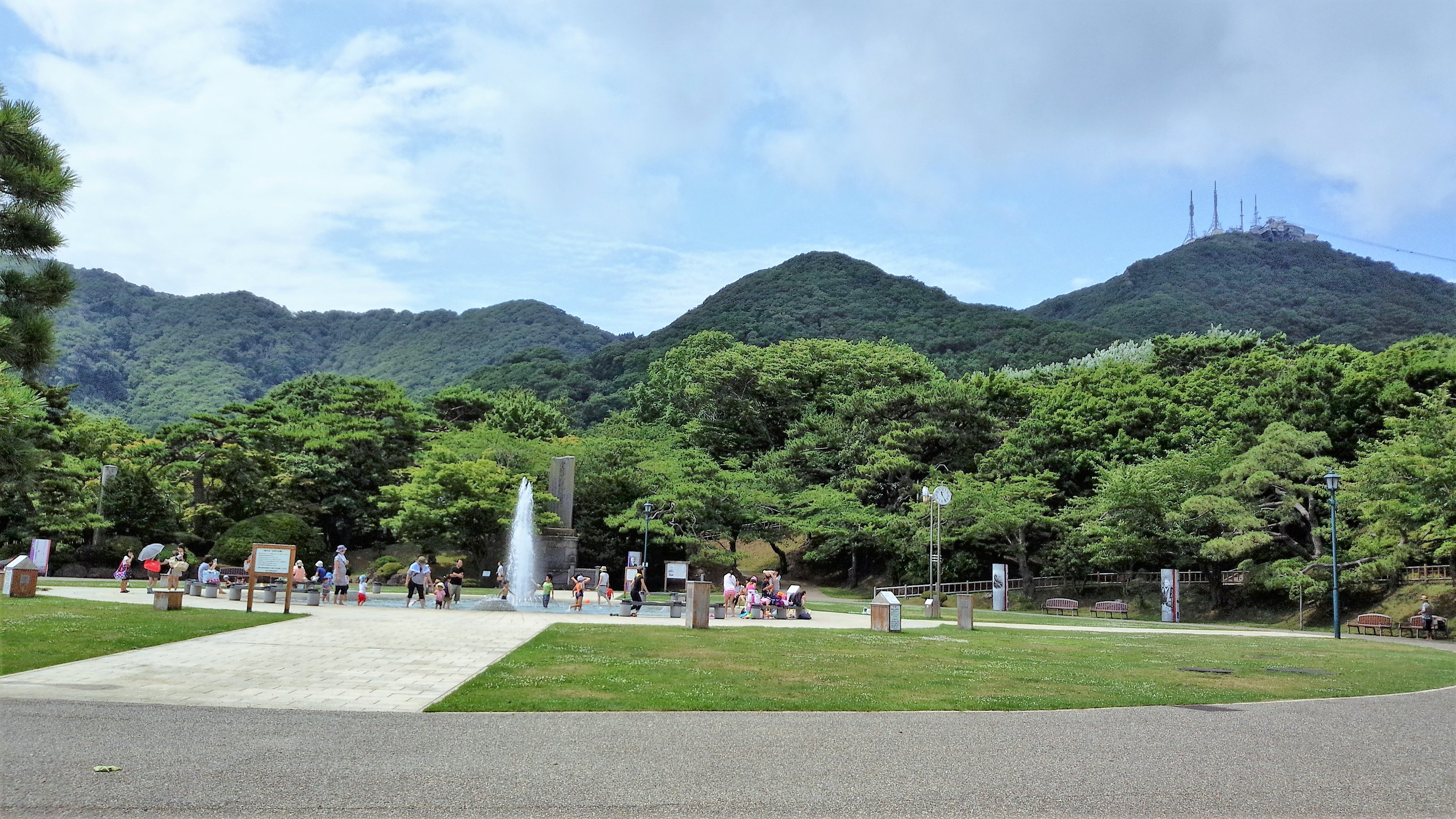 函館公園（北海道函館市青柳町）